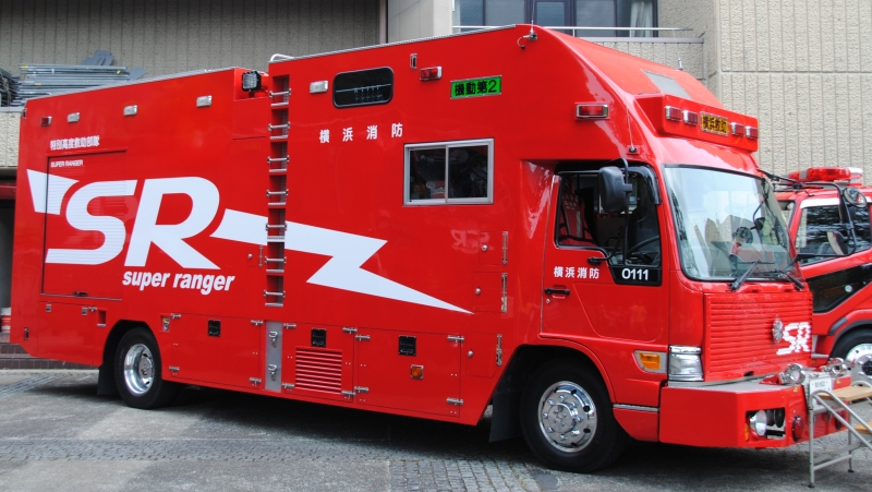 横浜市消防局の機動第2救助工作車。